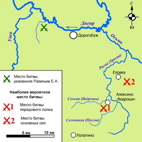 Схема месторасположения поля Ведрошской битвы (14 июля 1500 г.)